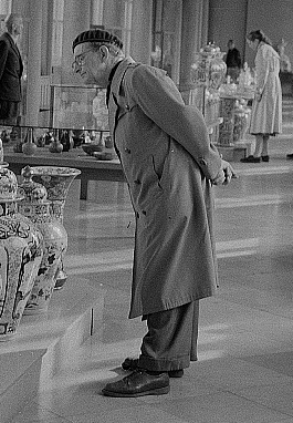 Original image description from the Deutsche Fotothek Dresden. Zwinger, Porzellansammlung, Blick innerhalb der Langgalerie mit Ausstellungsvitrinen und Vasen, Selbstporträt? des Fotografen